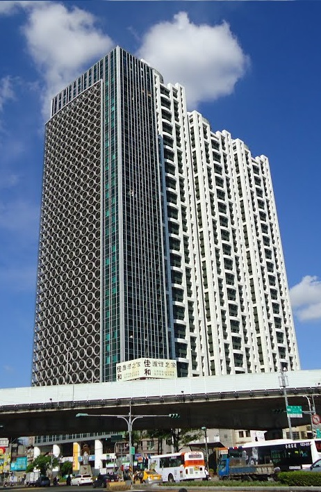 新巨蛋為位於新北市板橋區的摩天大樓，由三圓建設興建，鄧培華建築師事務所設計，包括4棟建築，最高之B棟樓高168.35米(含屋突188.0米)。